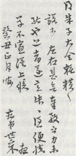 남계 박세채 필적